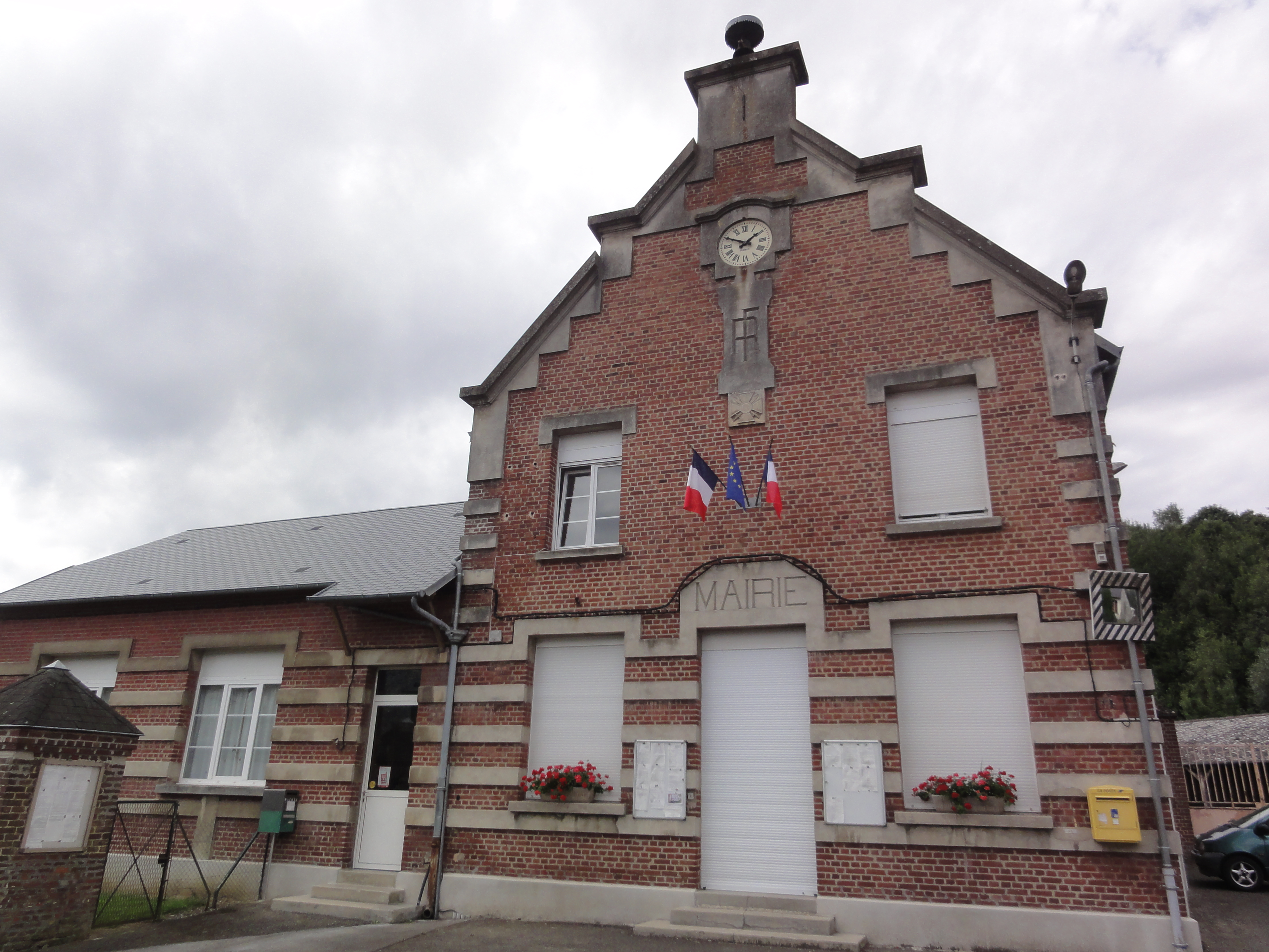 La Neuville-en-Beine (Aisne) mairie